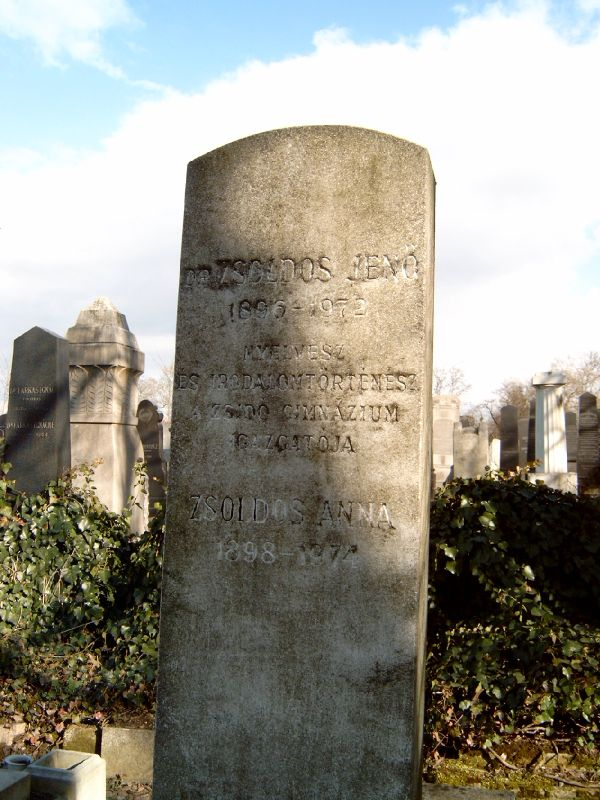 Zsoldos Jenő (Bp., 1896. ápr. 2. – Bp., 1972. nov. 20.): irodalomtörténész, nyelvész, pedagógus sírja Budapesten a Kozma utcai izraelita temetőben. (5B-9-4.)